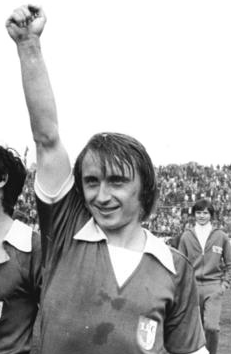 Title: Berlin, FDGB-Pokal, 1. FC Magdeburg mit Pokal People in the image: Sparwasser, Jürgen: Fußballnationalspieler, 1. FC Magdeburg, Olympiade 1972, DDR (GND 136159745) * Seguin, Wolfgang: Fußballspieler, SC Magdeburg, Olympiateilnehmer 1972, DDR * Streich, Joachim: Fußballnationalspieler, 1. FC Magdeburg, Olympiade 1972, DDR Factual corrections and alternative descriptions are encouraged separately from the original description. Additionally errors can be reported at this page to inform the Bundesarchiv. Original historic description: ADN-ZB Mittelstädt 29.4.78 Berlin: FDGB-Fussballpokalendspiel 1. FC Magdeburg - Dynamo Dresden Der 1. FC Magdeburg gewann am 29.4.78 vor 50.000 Zuschauern im Stadion der Weltjugend in Berlin das Endspiel um den FDGB-Fußballpokal gegen Dynamo Dresden mit 1:0 (1:0) und errang damit zum fünften Mal die Trophäe. Hier Jürgen Sparwasser mit der Siegertrophäe. Neben ihm v.l.n.r. seine Mannschaftskameraden Detlef Raugust, Wolfgang Seguin und Joachim Streich.